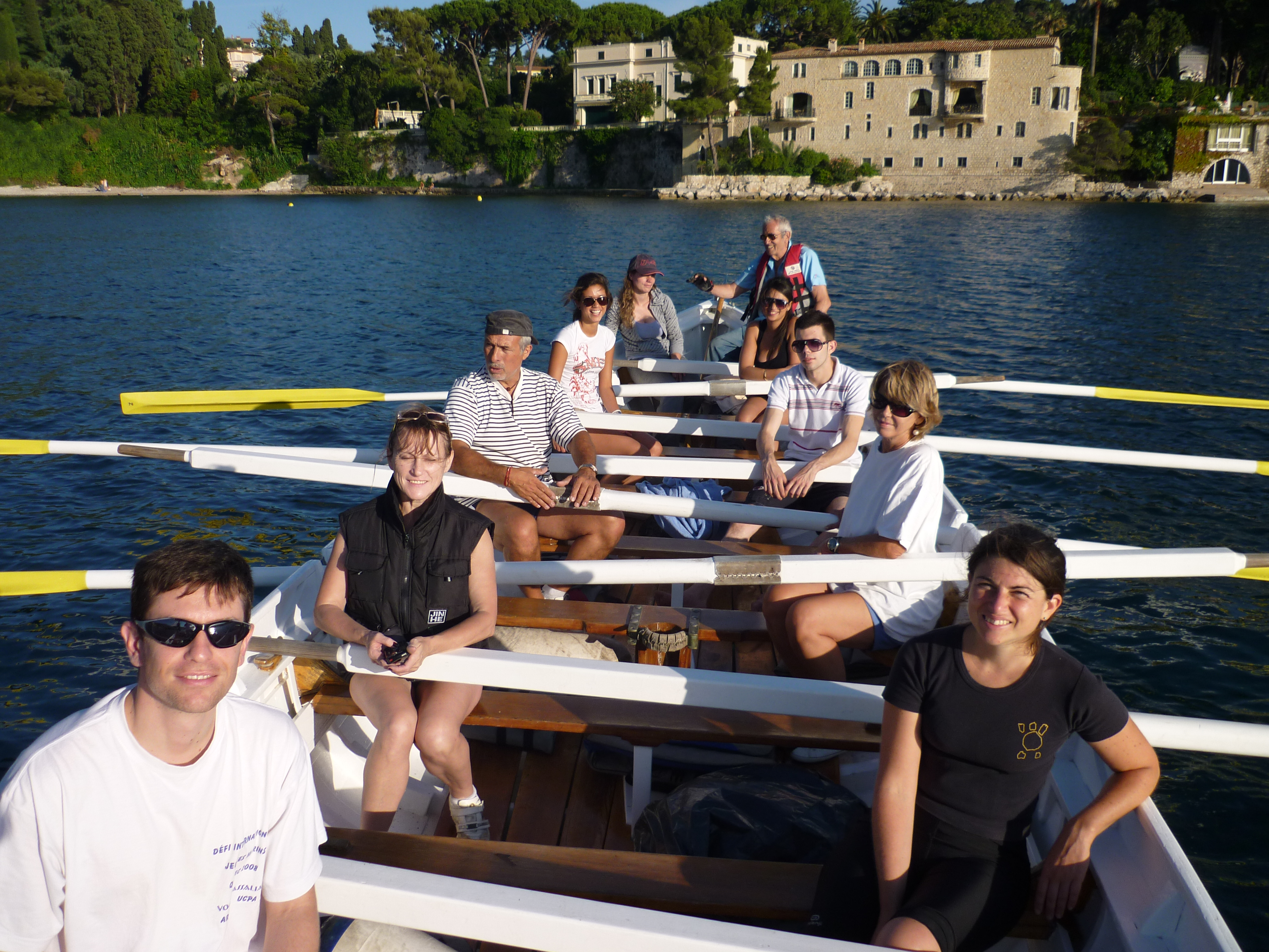 Laïssa Ana, la Yole de Villefranche-sur-Mer, durant une navigation en soirée dans la Rade de Villefrabche